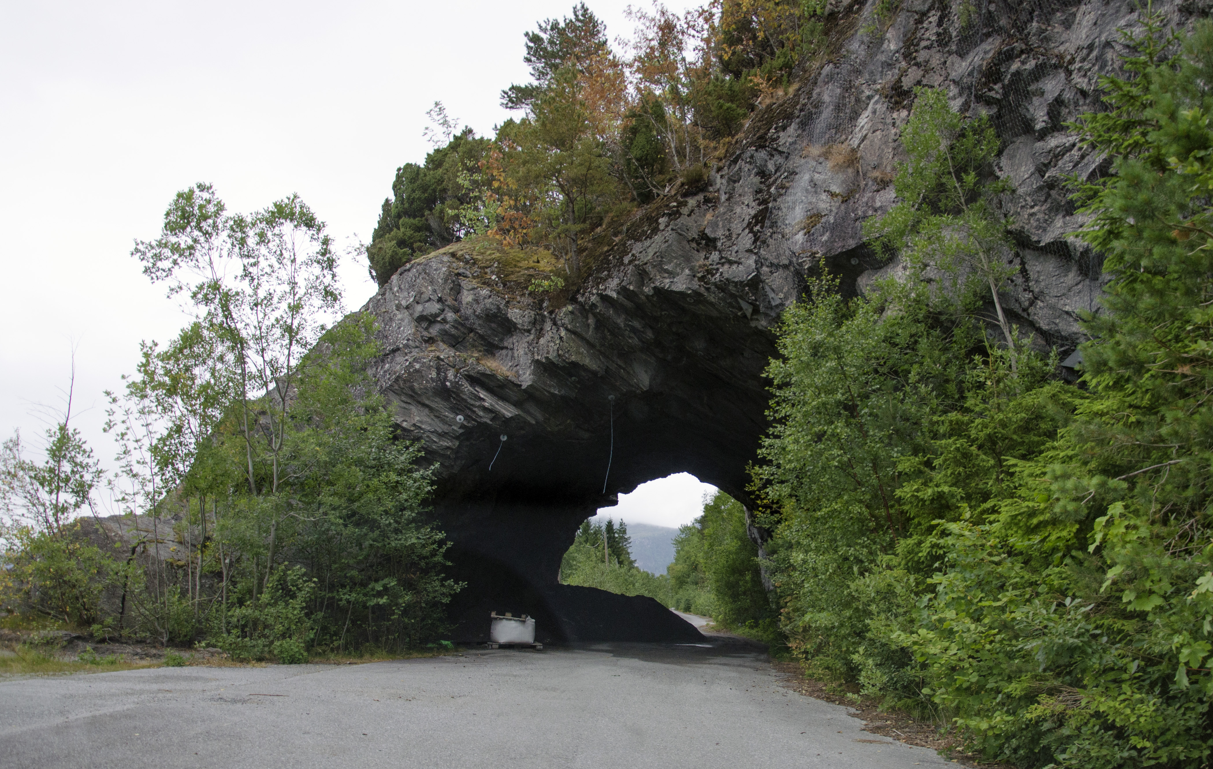 Skahammartunnelen, tidligere på fylkesvei 62, Sunndal